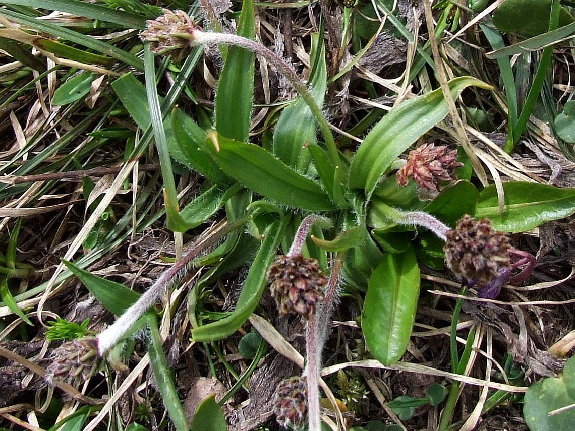 Plantago atrata var. carpathica (habitat:Tatra Mountains, Ciemniak)